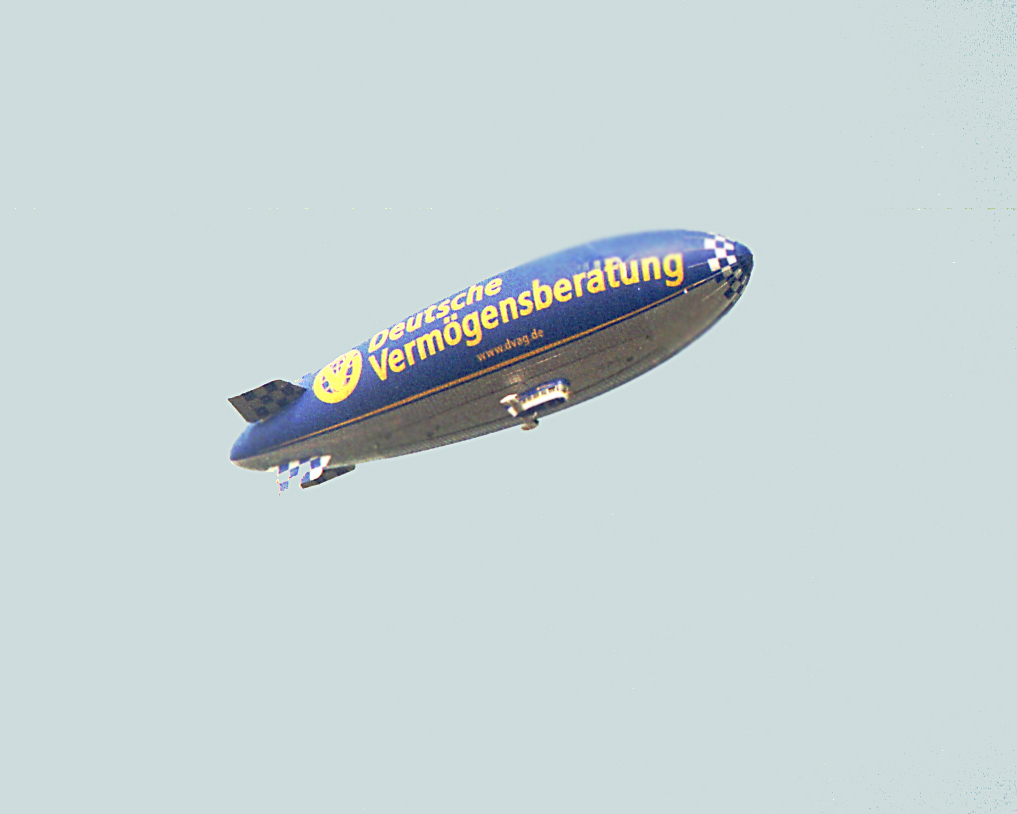 Дирижабль над Нюрнбергом. Лето 2001 года